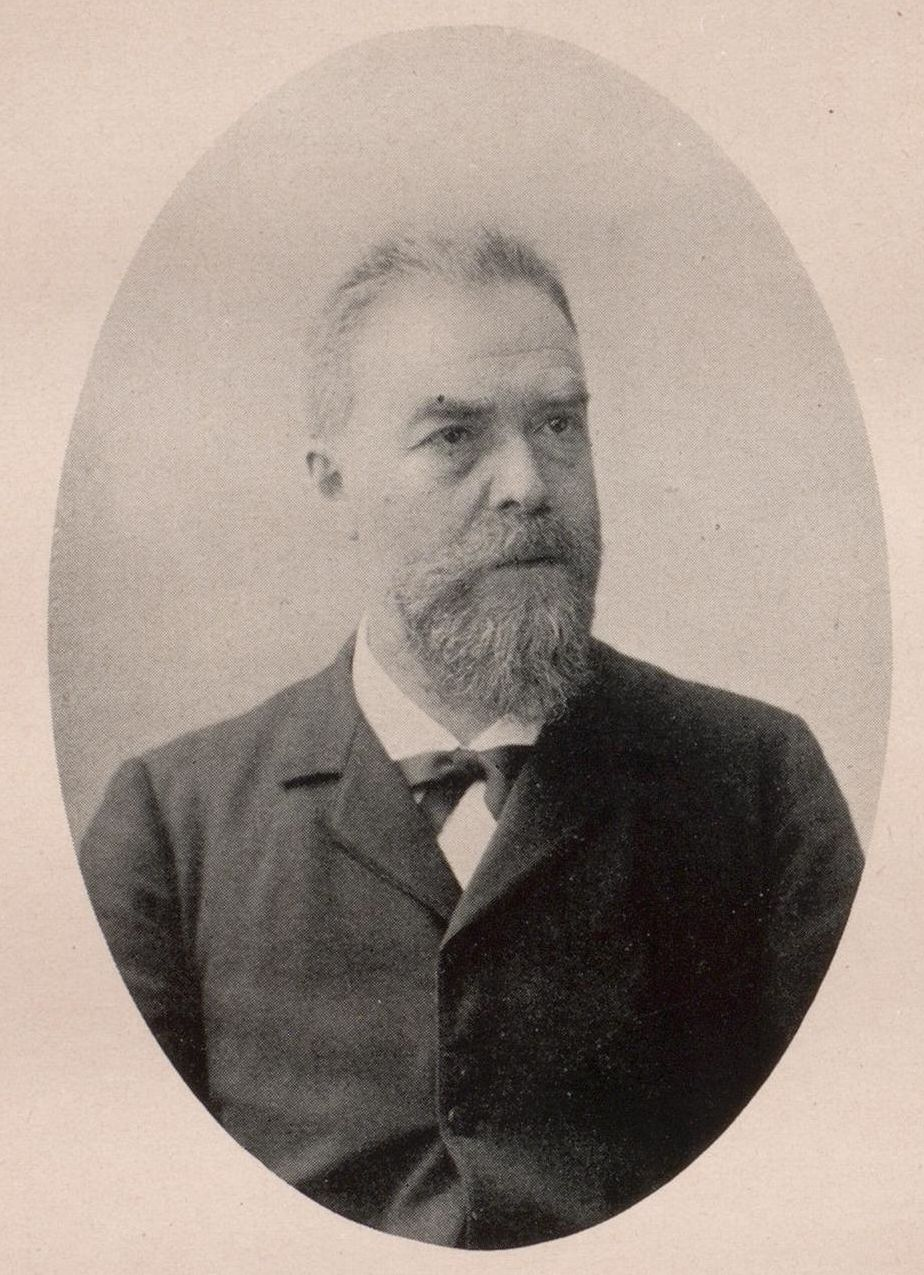 Porträtfoto von Philipp Lotmar